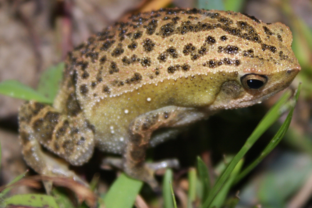 Taken in Wu Kau Tang area.